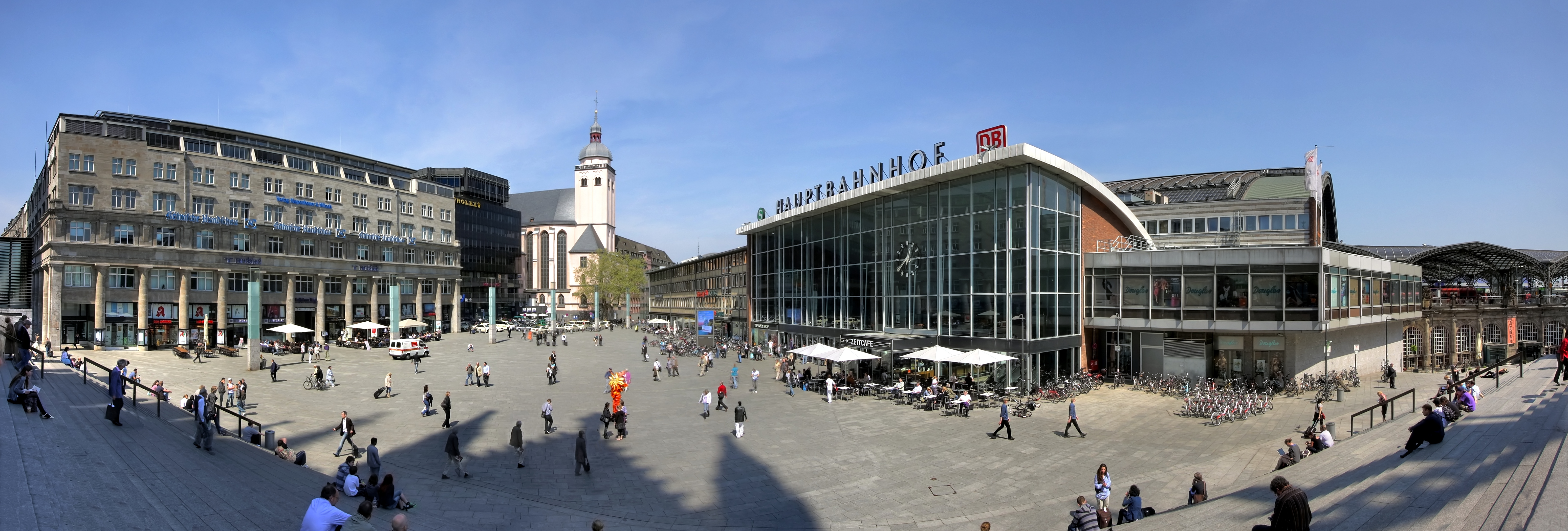 Bahnhofvorplatz Köln. Von links nach rechts: Deichmannhaus, St. Mariä Himmelfahrt, Hauptbahnhof, Alter Wartesaal.